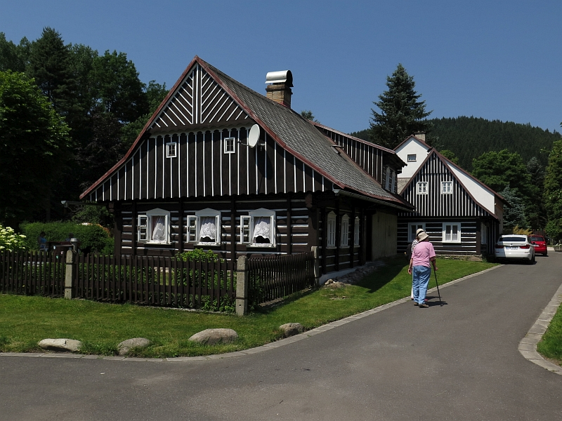 Dům čp. 396, Jablonec nad Jizerou 396, Jablonec nad Jizerou.